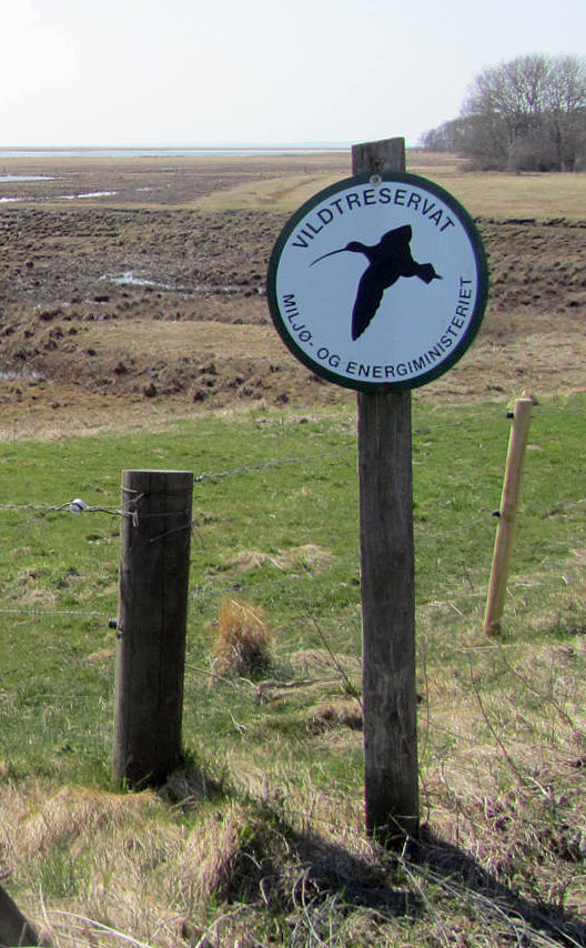 Dansk vildtreservatskilt